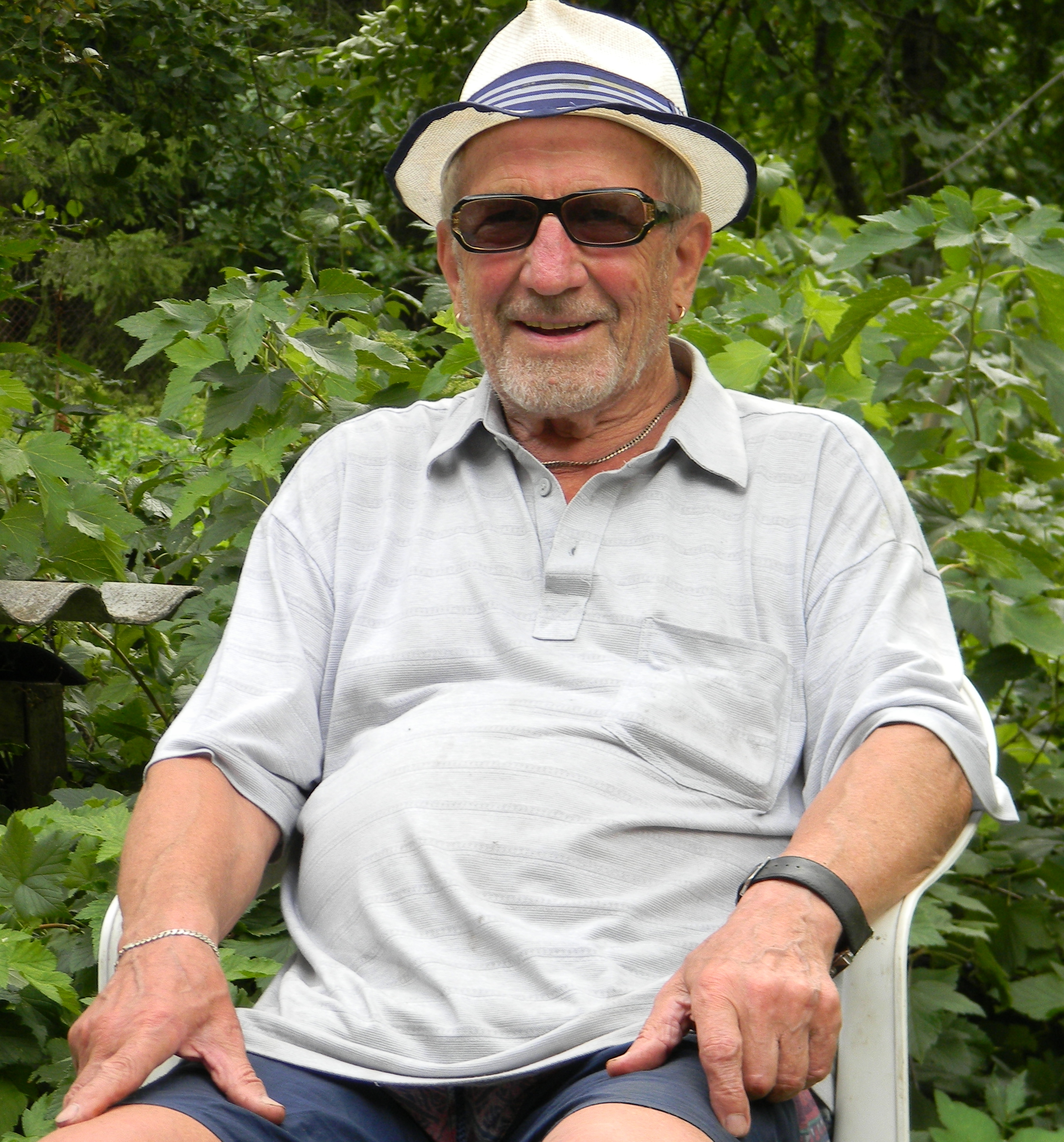 Kalju Saareke 2011. a